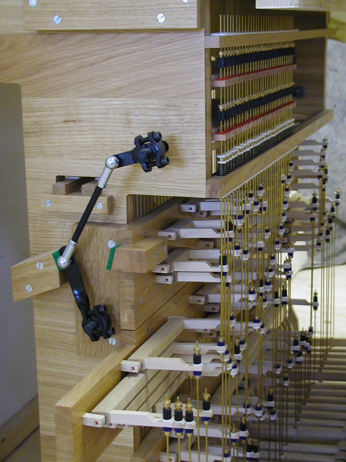 mechanischer Koppelstock mit Manual- und Pedalkoppeln einer Orgel